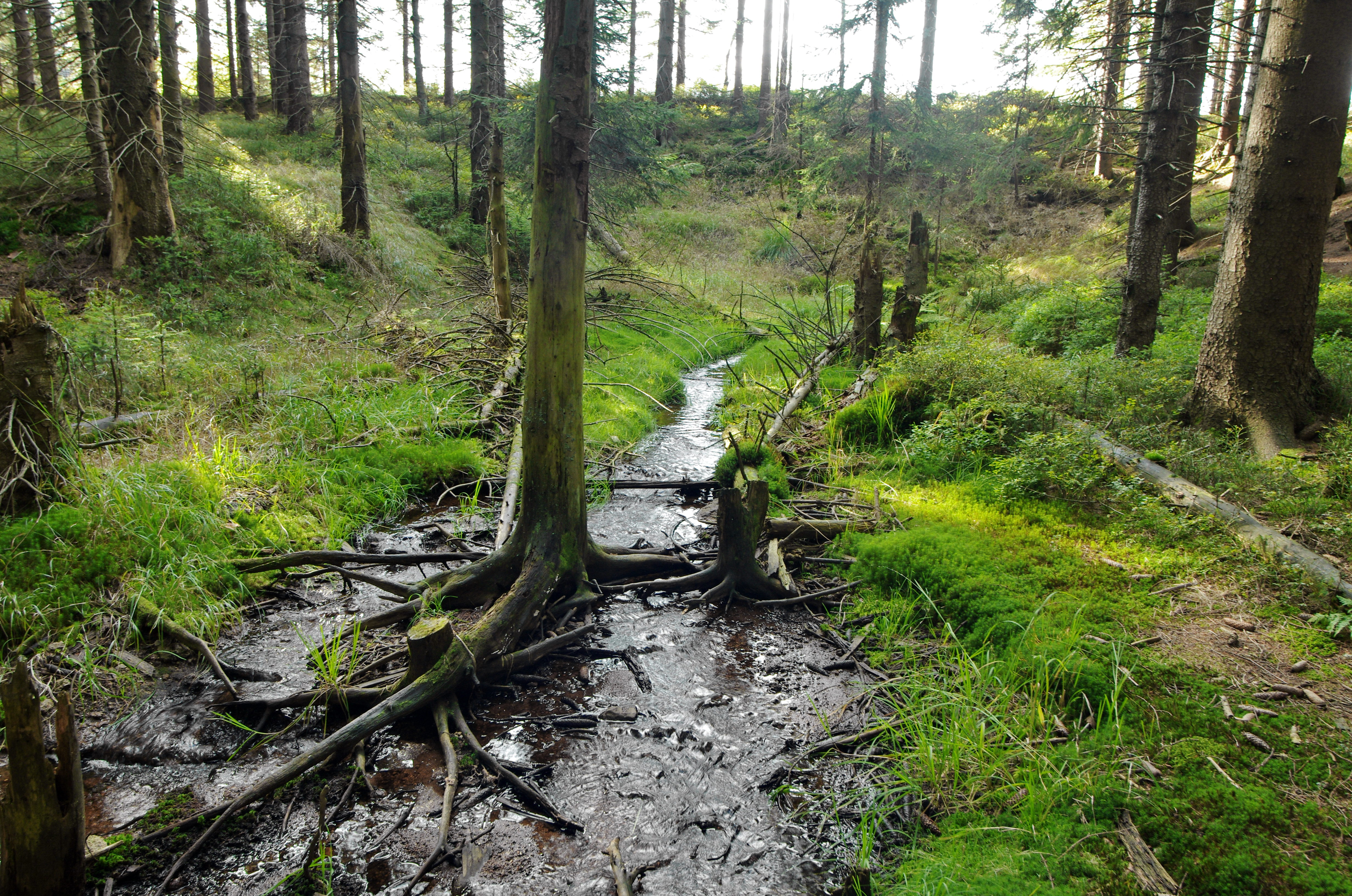 Jelení potok pod Rolavským rybníkem (rybník Lícha), v přírodním parku Přebuz, okres Sokolov